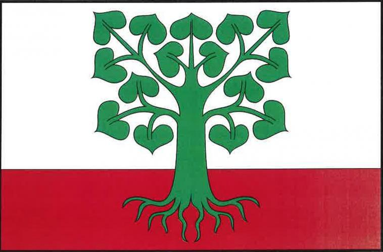 Klokočov HB vlajka